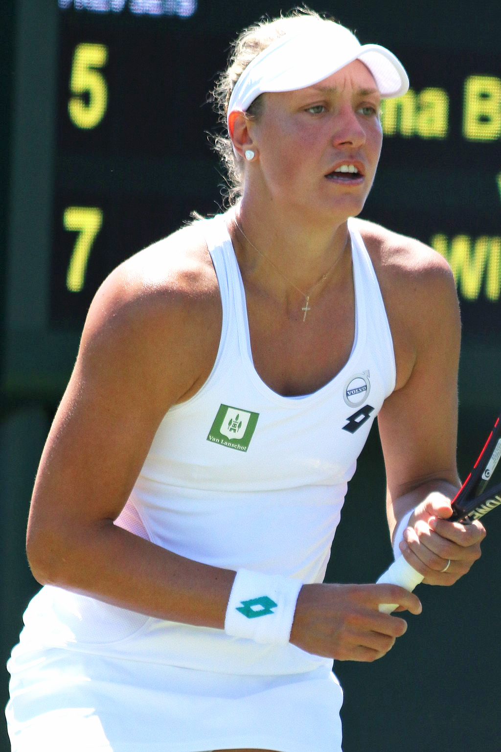 Wickmayer WM18 (47)